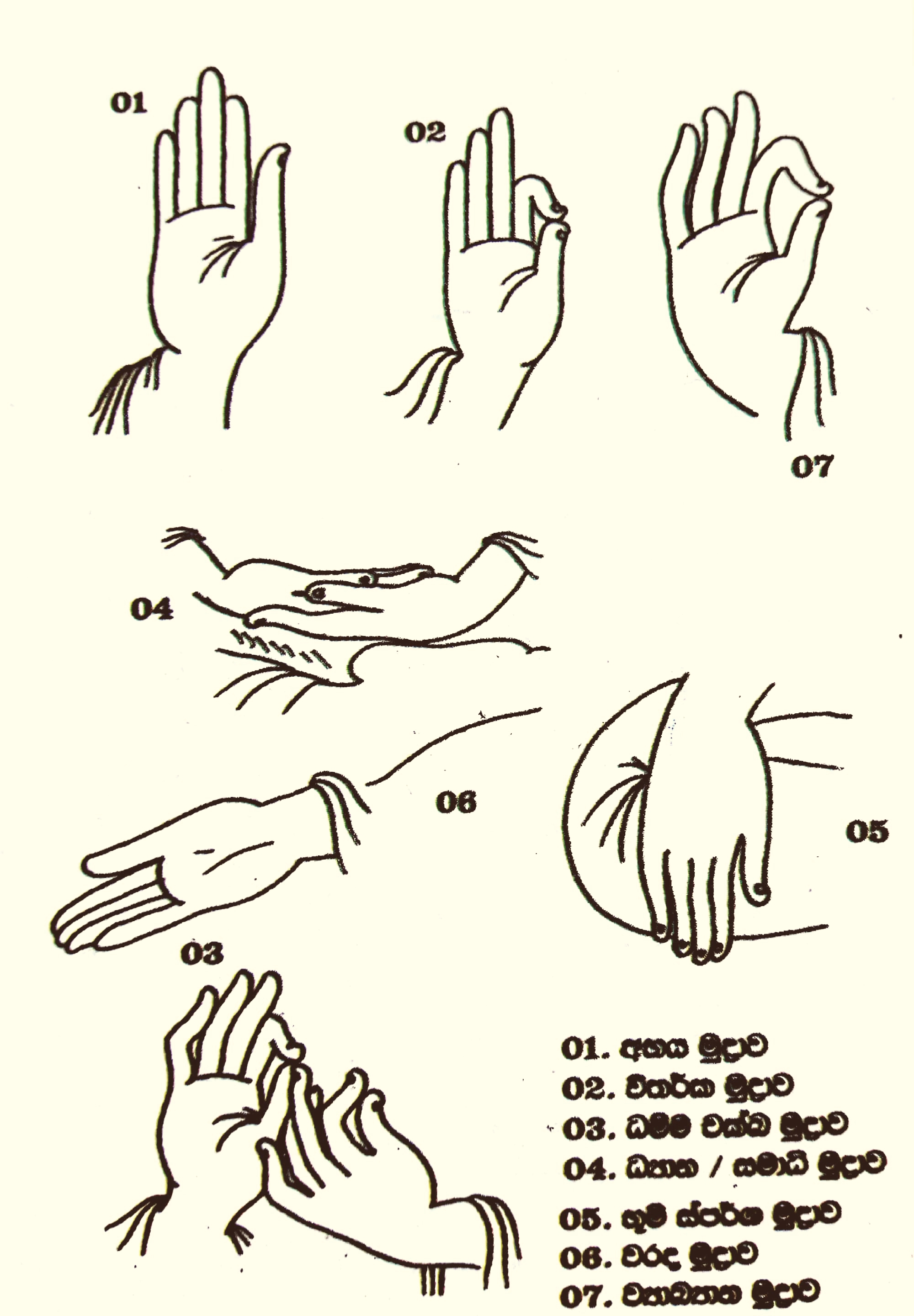 සිංහල: මුද්‍රා වර්ග සහ එවායේ නම්